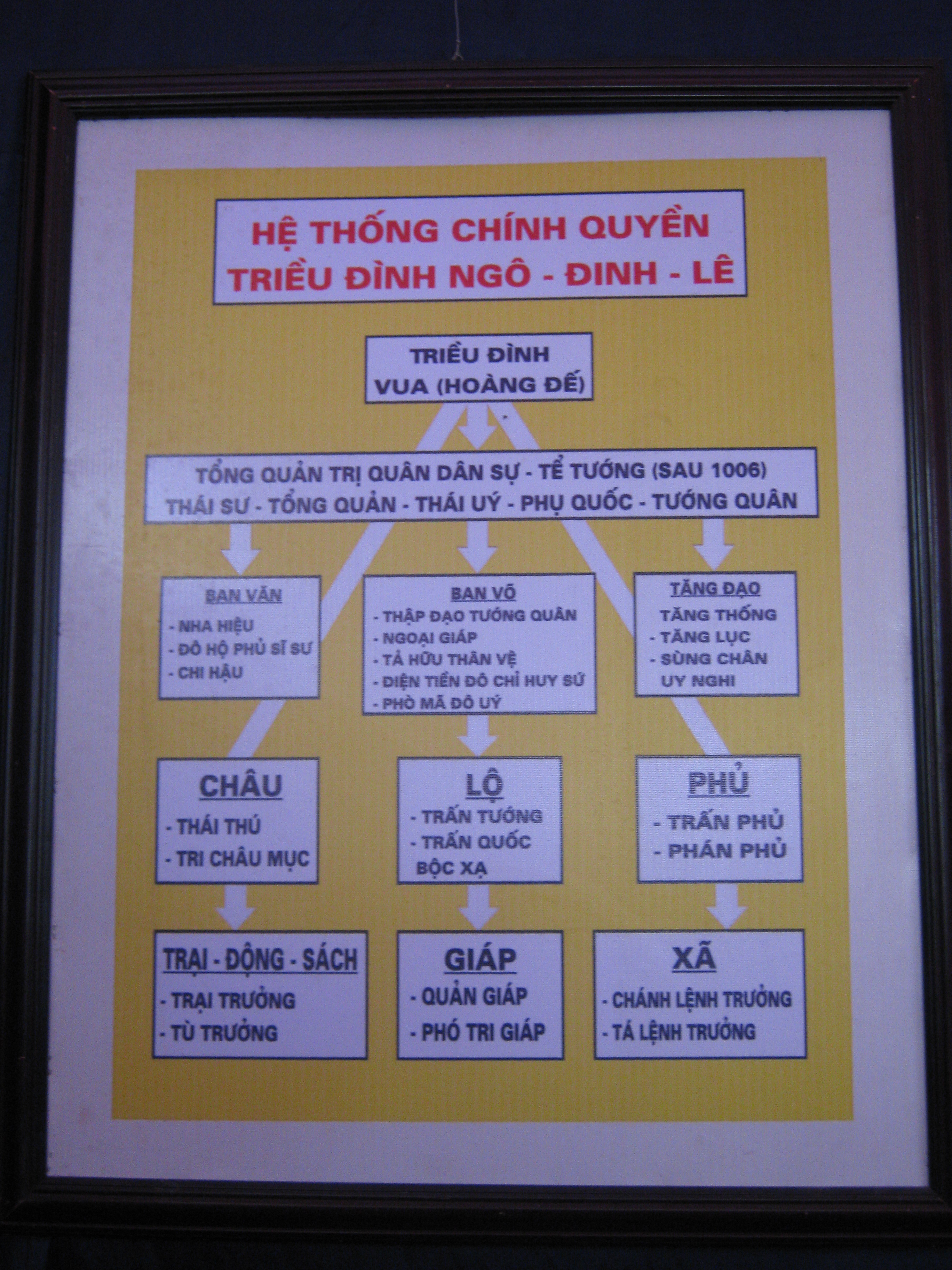 Hệ thống chính quyền thời Ngô - Đinh - Tiền Lê ảnh chụp tại phòng chưng bày khu di tích cố đô Hoa Lư - xã Trường Yên, Hoa Lư, Ninh Bình